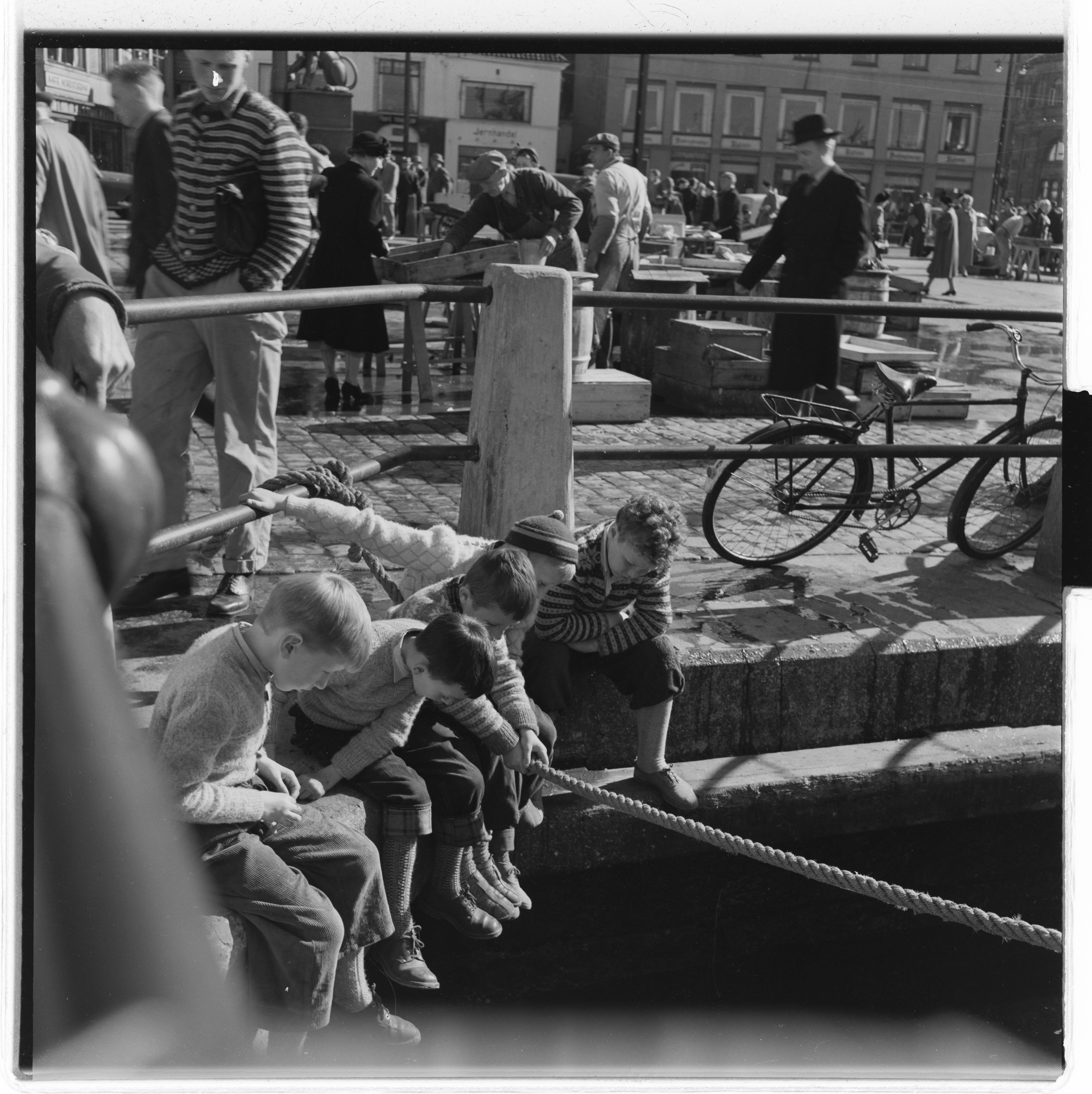 Bildet er hentet fra Arkivverket. Fisketorget i Bergen. Arkivinstitusjon : Riksarkivet Arkivnavn : Billedbladet NÅ Sted : Norge, Hordaland, Bergen, Bergen Emneord: By, Torghandel, Barn Avbildet